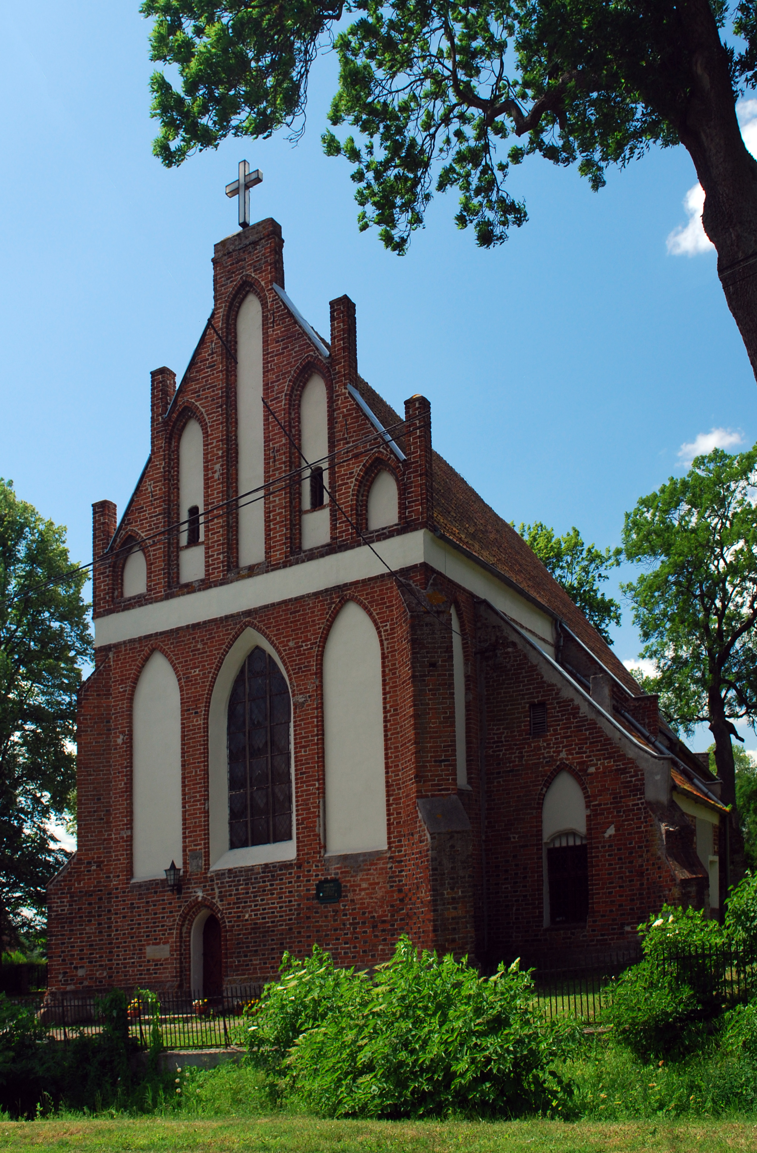 Trutnowy - rzymskokatolicki kościół parafialny p.w. śś. Piotra i Pawła, 2 poł. XIV, XVII